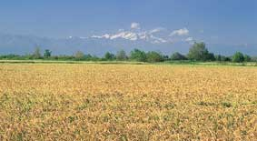 Reisfeld